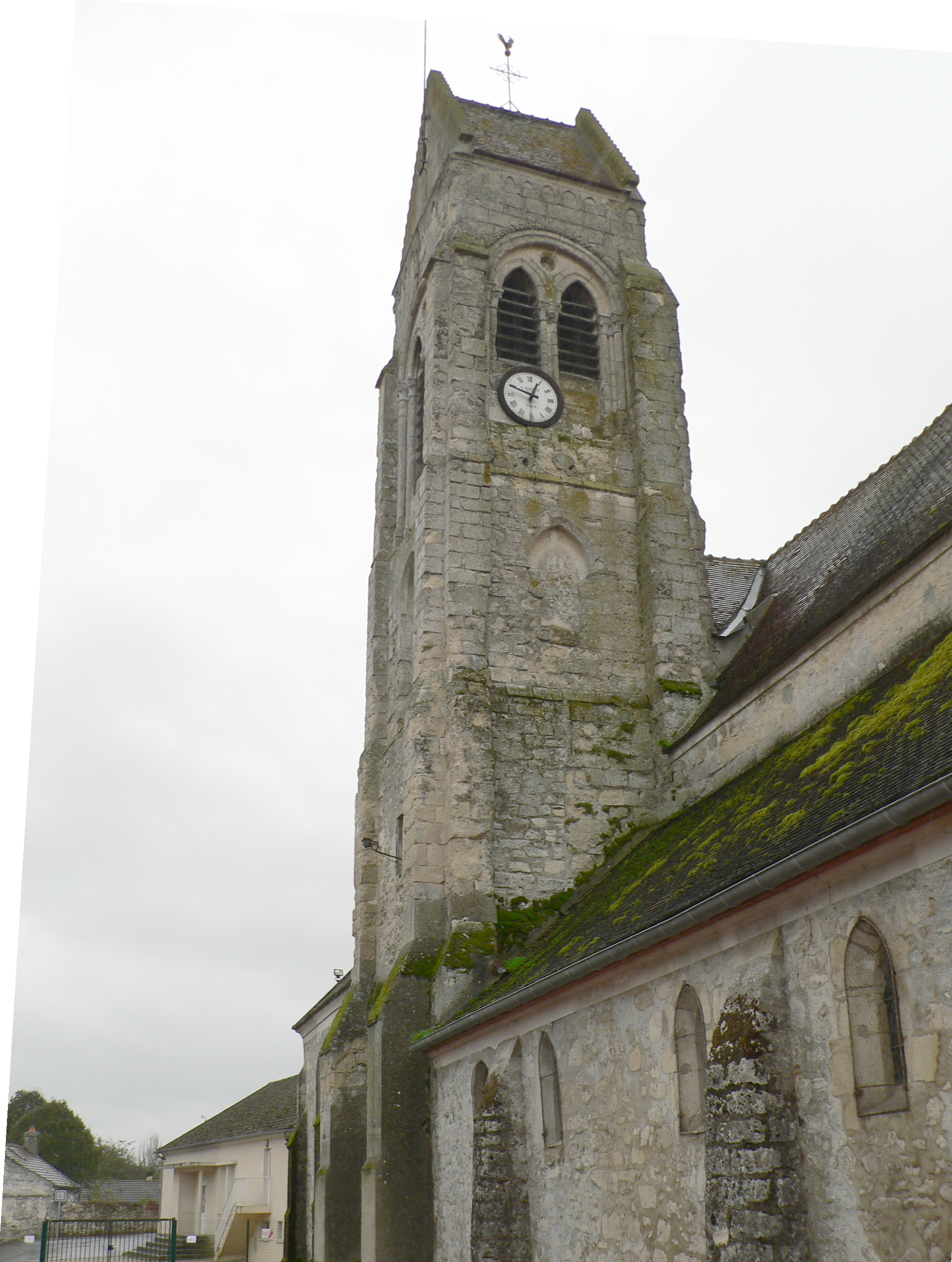 Le clocher en bâtière, époque de transition, XIIe-XIIIe siècle.